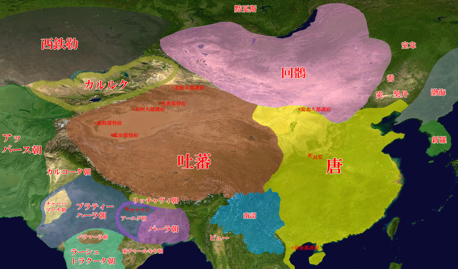 8世紀後半の回鶻とその周辺国。